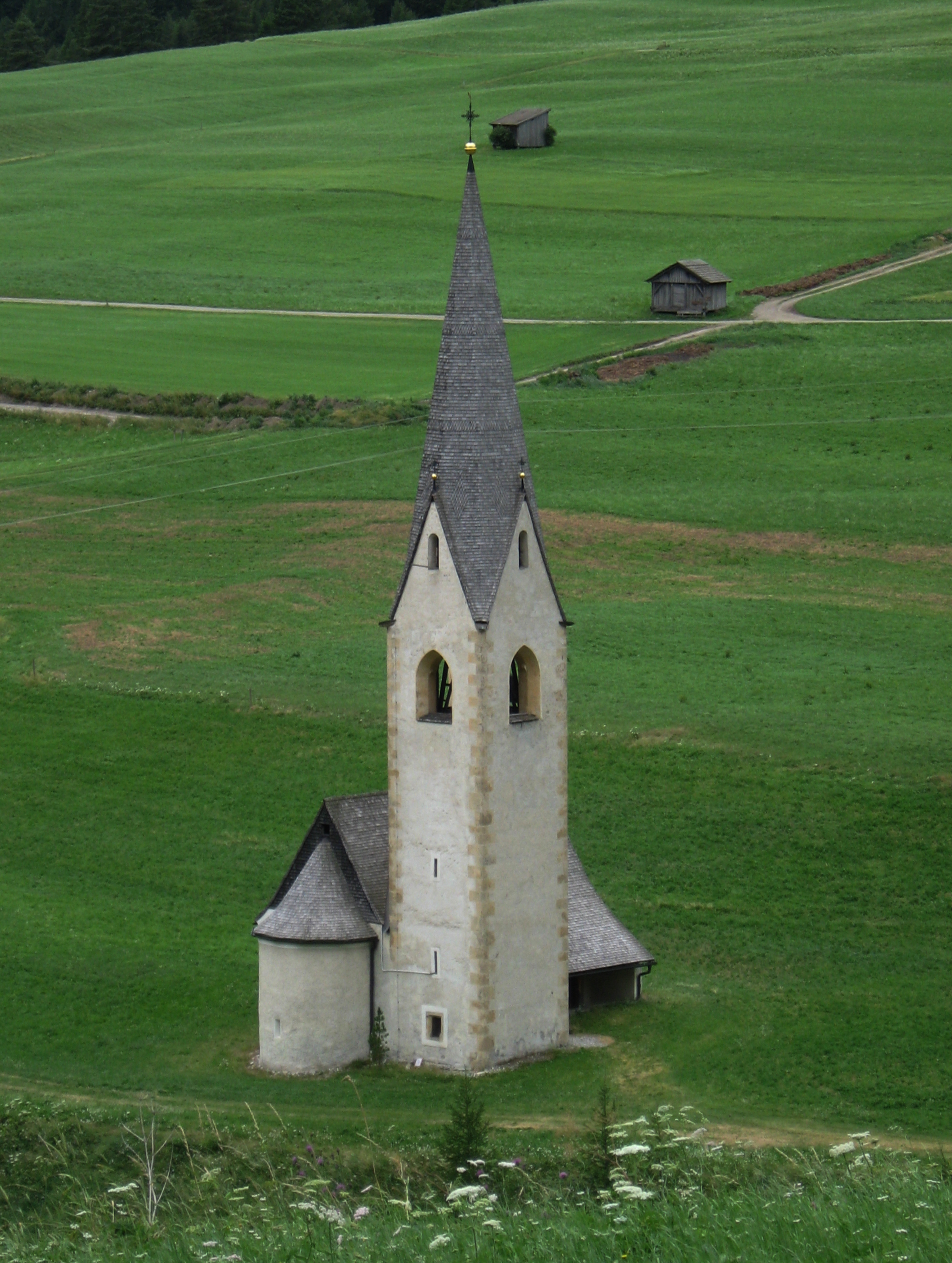 Kath. Filialkirche St. Georg von Nordosten